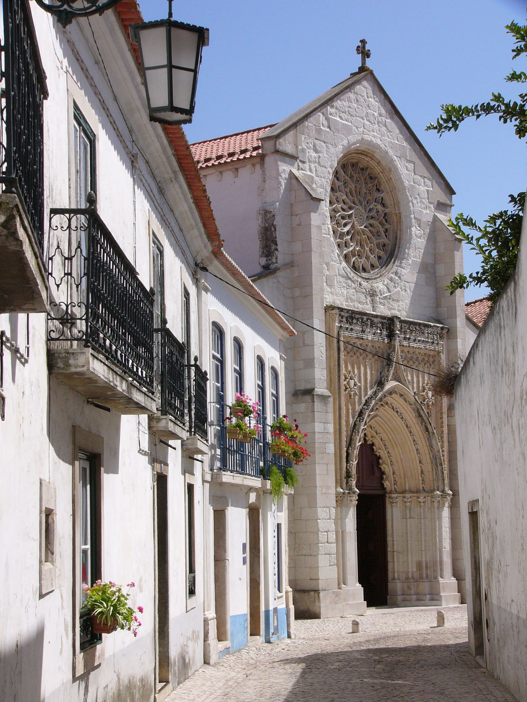 Graça Church in Santarém, Portugal